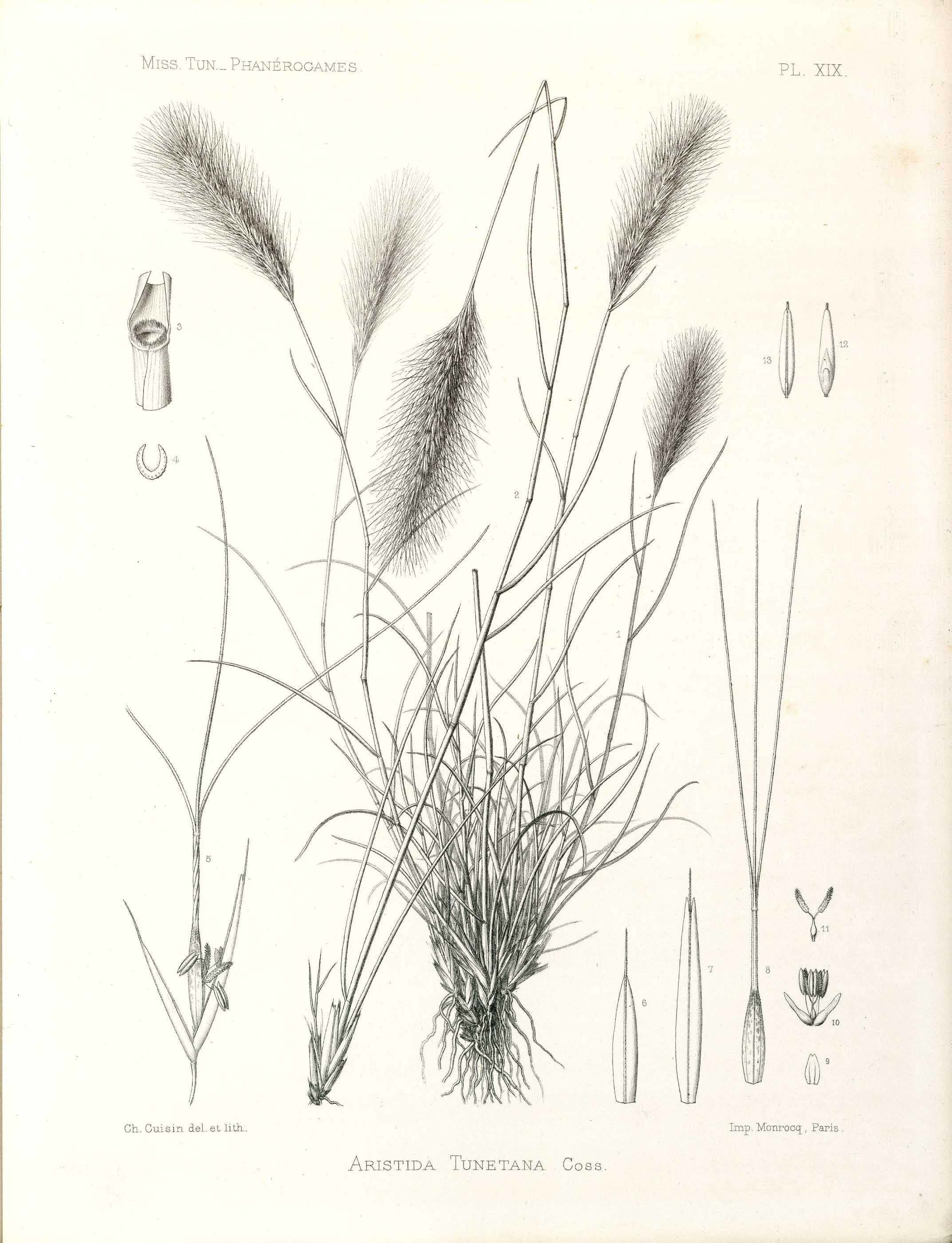 Bonnet, Edmond & Barratte, Jean-François-Gustave. Exploration scientifique de la Tunisie. Illustrations des espèces nouvelles, rares ou critiques de phanérogames de la Tunisie, 1895